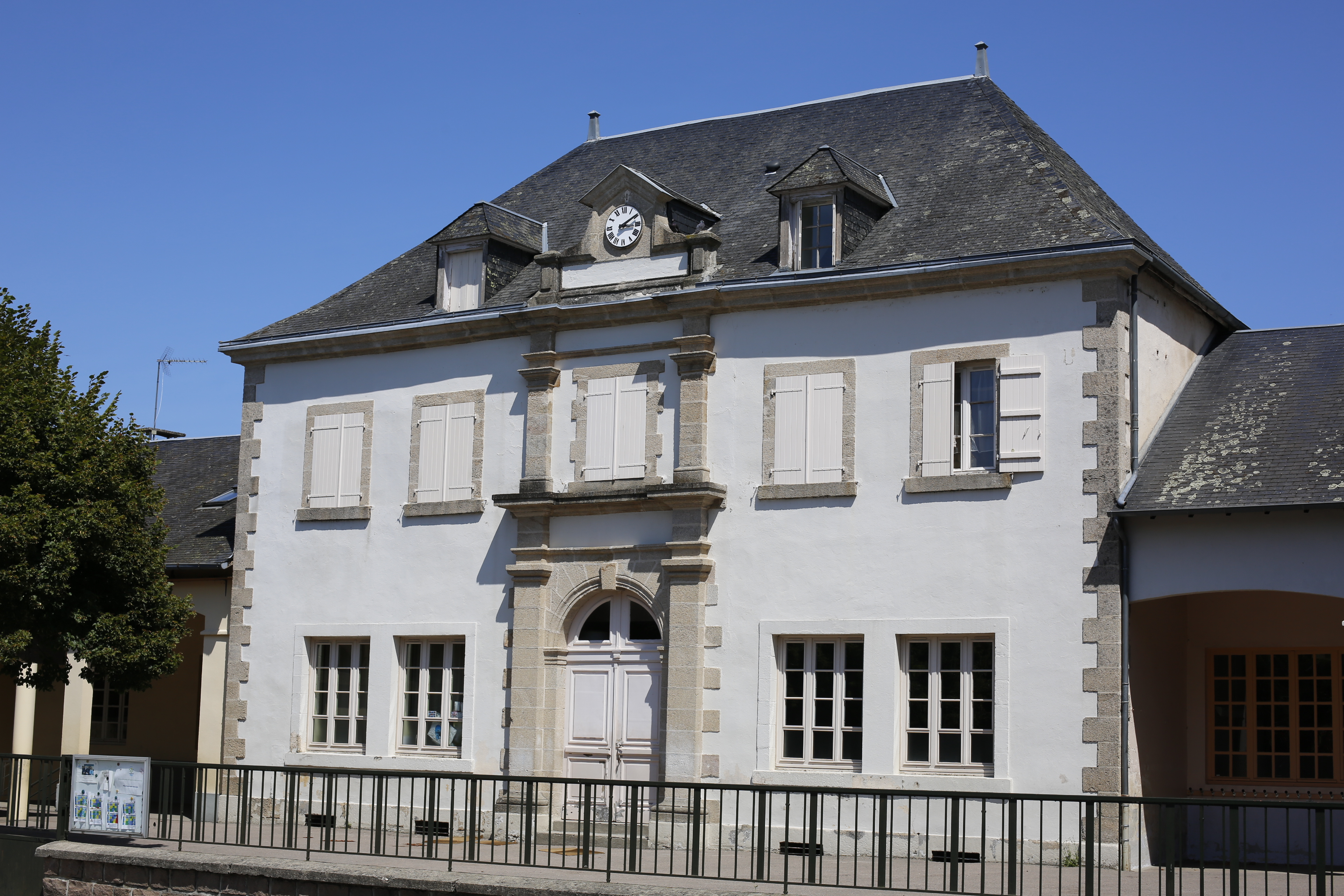 École primaire de Naves.